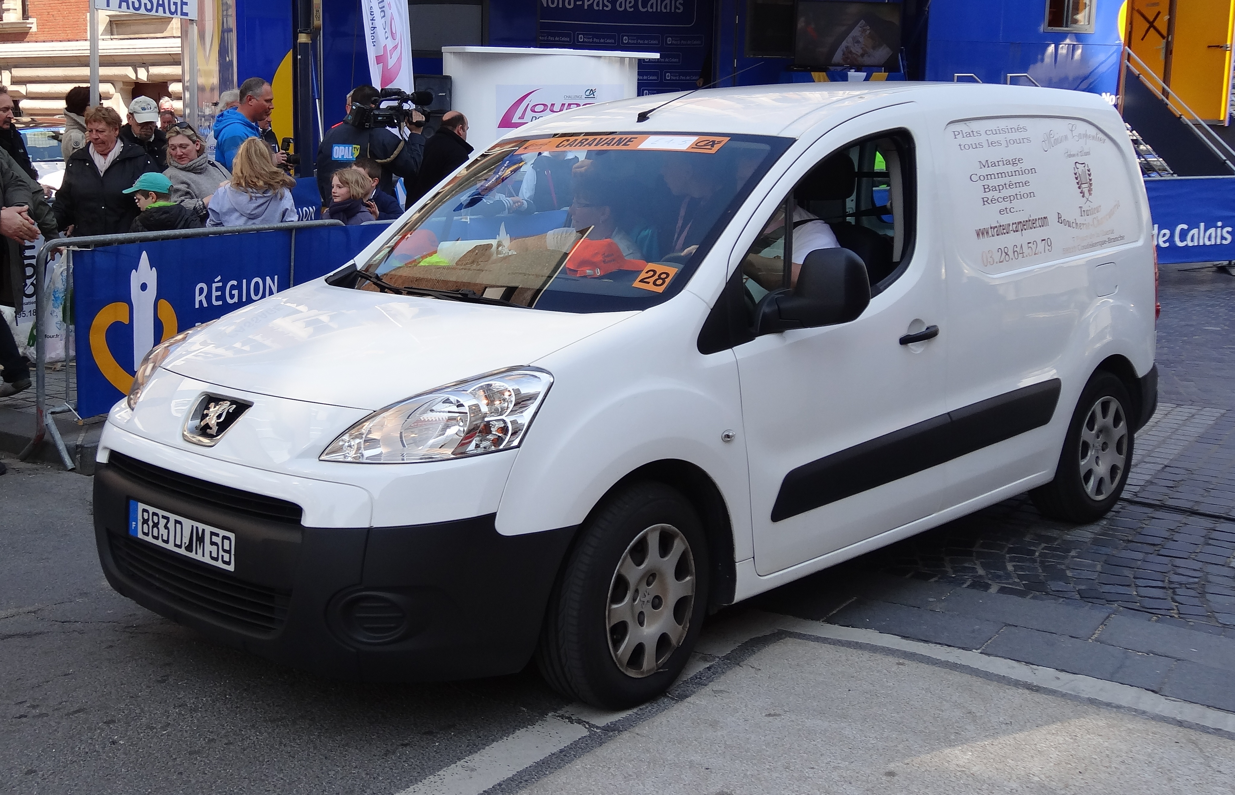 Фургон Peugeot Partner 2 (2008-2012)